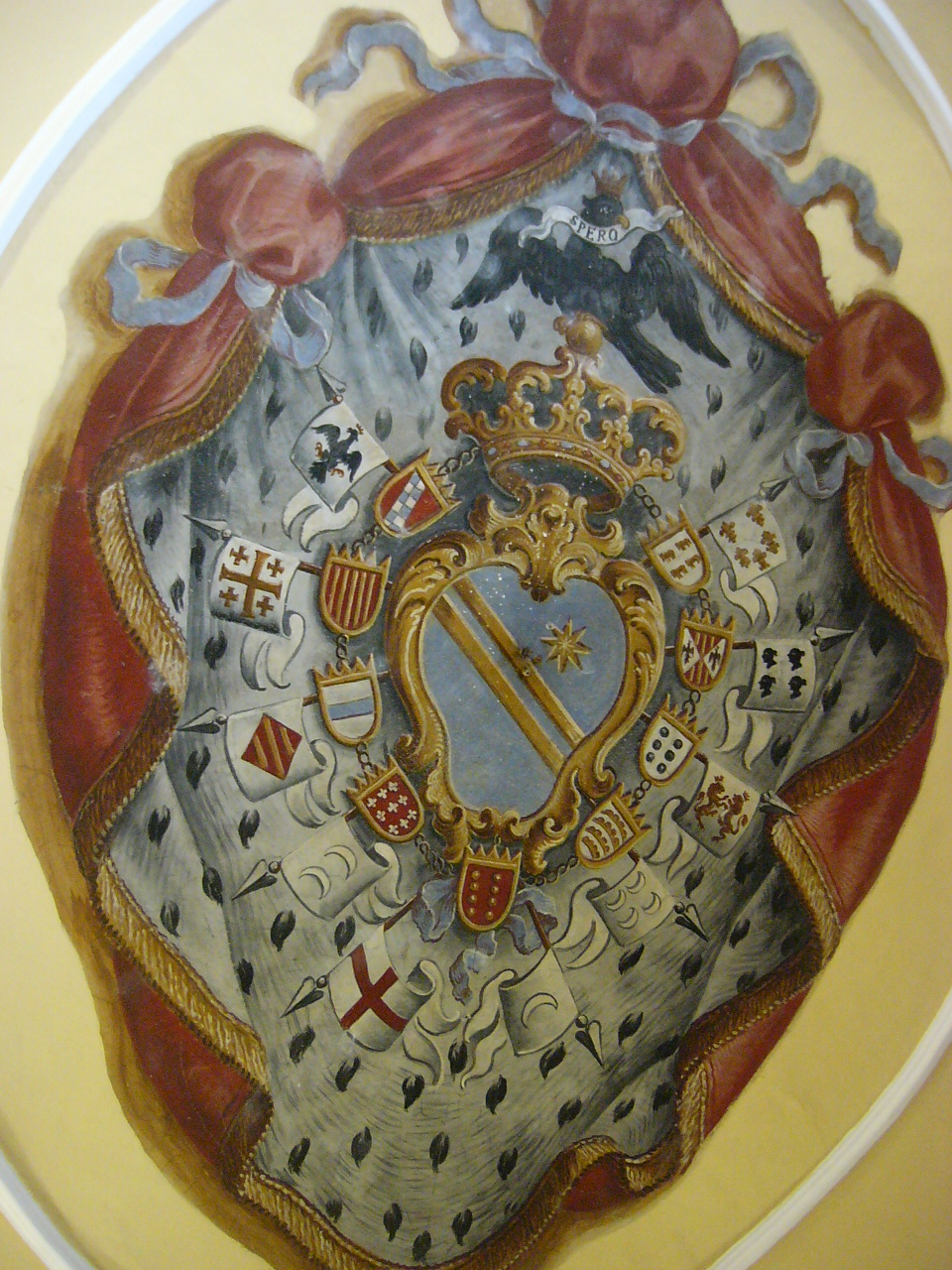 Stemma del casato dei Gravina Cruyllas. Affresco nel palazzo omonimo a Catania